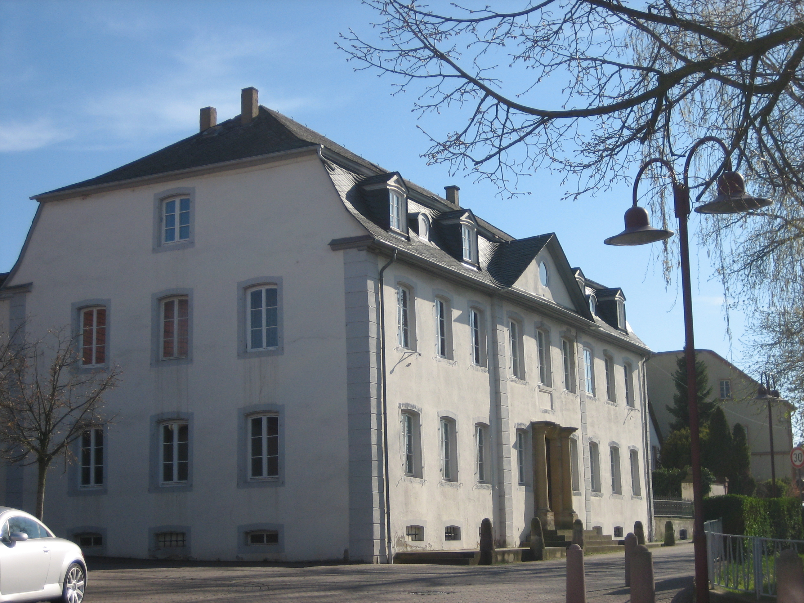 castle wendelsheim; Erbaut wurde dieses Schloss um 1758 im Auftrag von Rheingraf Carl Magnus Graf zu Salm-Gaugrehweiler (* 26.03.1718 + 01.07.1793), u.a. in Versailles aufgewachsen, von seinem Schloßbaumeister Johann Leonard Reichel, der ihm auch sein neues Residenzschloss Gaugrehweiler baute. Carl Magnus wurde 1775 zu zehn Jahre Haft vom Kaiser Josef II. wegen Finanzbetrug verurteilt. Nach vorzeitiger Haftentlassung starb er verarmt in seinem bereits von den Franzosen besetzten Schloss Gaugrehweiler (1807 abgerissen). 1788 verlegte der neue Eigentümer Wild- und Rheingraf Karl Ludwig Wilhelm Theoder zu Salm-Grumbach, seine Residenz von Grumbach hierher, mußte aber bereits 1792 vor den Franzosen flüchten. ´Die Vierflügelanlage mit spätbarockem, abgewalmtem Mansarddachbau; Gewölbestall, gegenüberliegendem ummauerten Schlossgarten wurde 1807 als Volksbesitz versteigert. Wegen des linksrheinischen Gebietsverlustes wurde sein Sohn später entschädigt. Als Entschädigung erhielt er durch Reichsdeputationshauptschluss im Jahre 1803 Stadt und Amt Horstmar. Im Jahre 1817 wurde er durch den König von Preußen in den Fürstenstand erhoben und führte nun den Titel Fürst zu Salm-Horstmar, dessen Geschlecht heute noch besteht. Schloss Wendelsheim ist heute im Privatbesitz, aber nicht im Eigentum der Fürsten zu Salm-Horstmar.